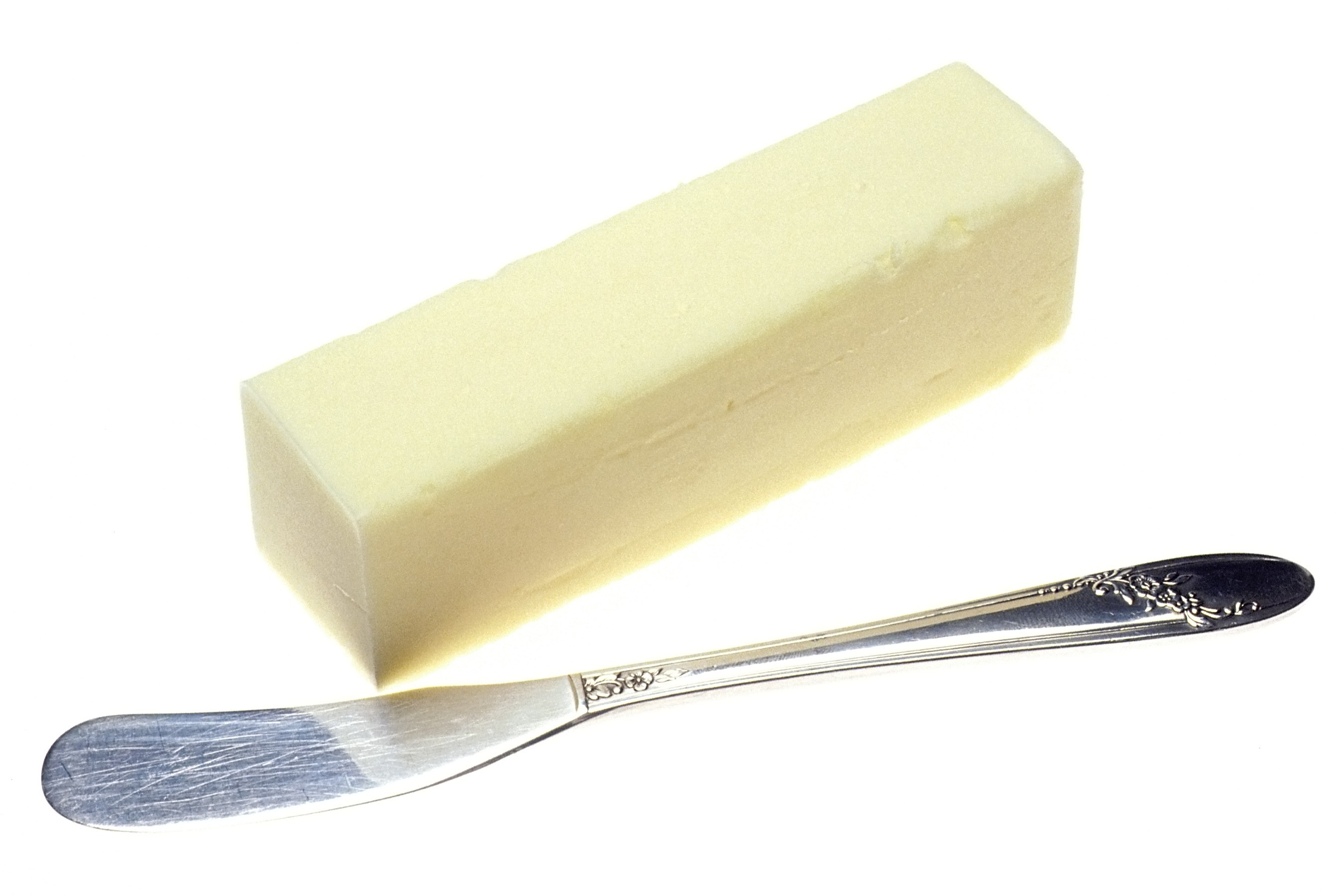 Butter and a butter knife